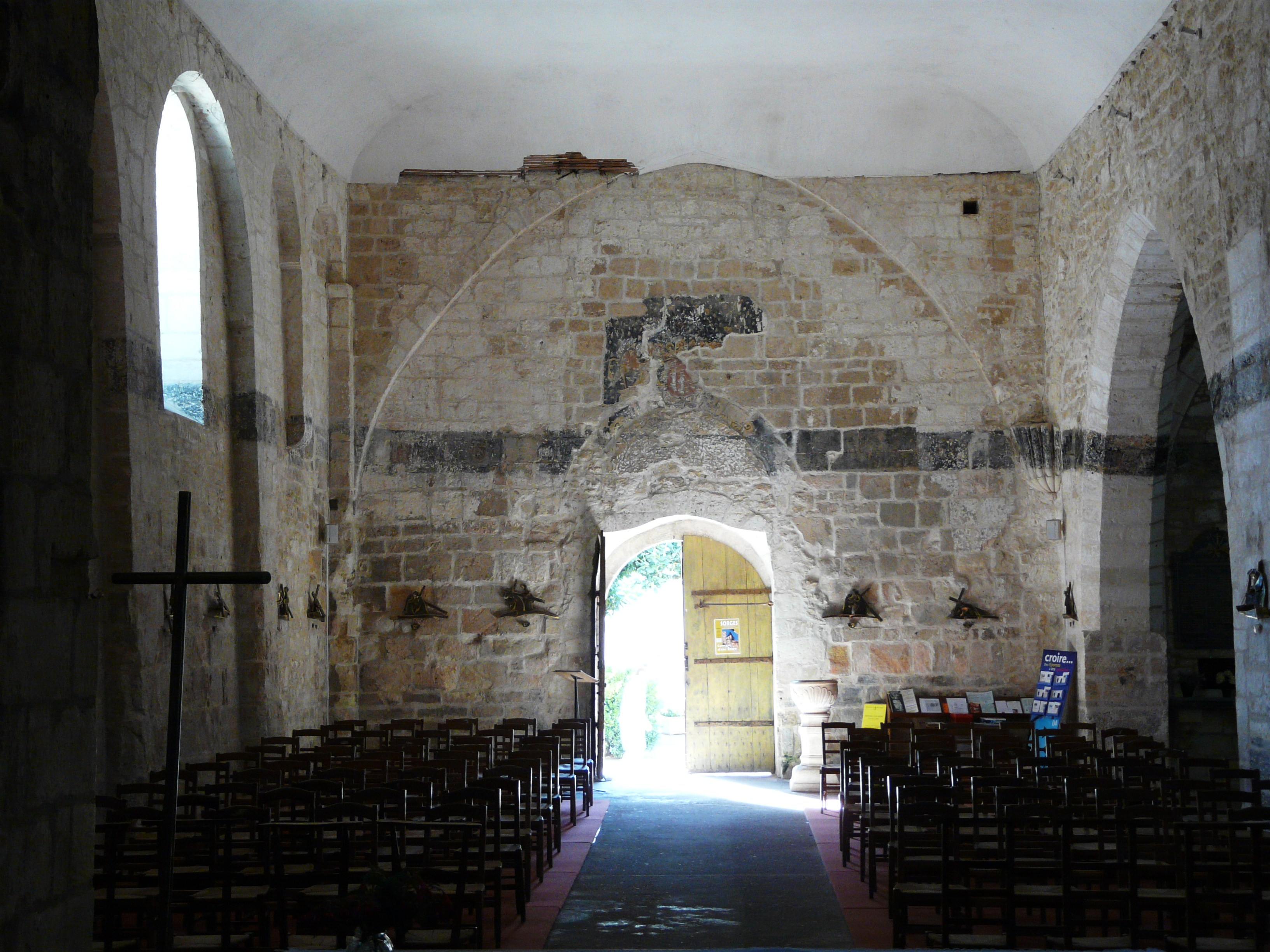 La nef de l'église Saint-Germain d'Auxerre, Sorges, Dordogne, France. La bande noire, à mi-hauteur, est une litre funéraire.